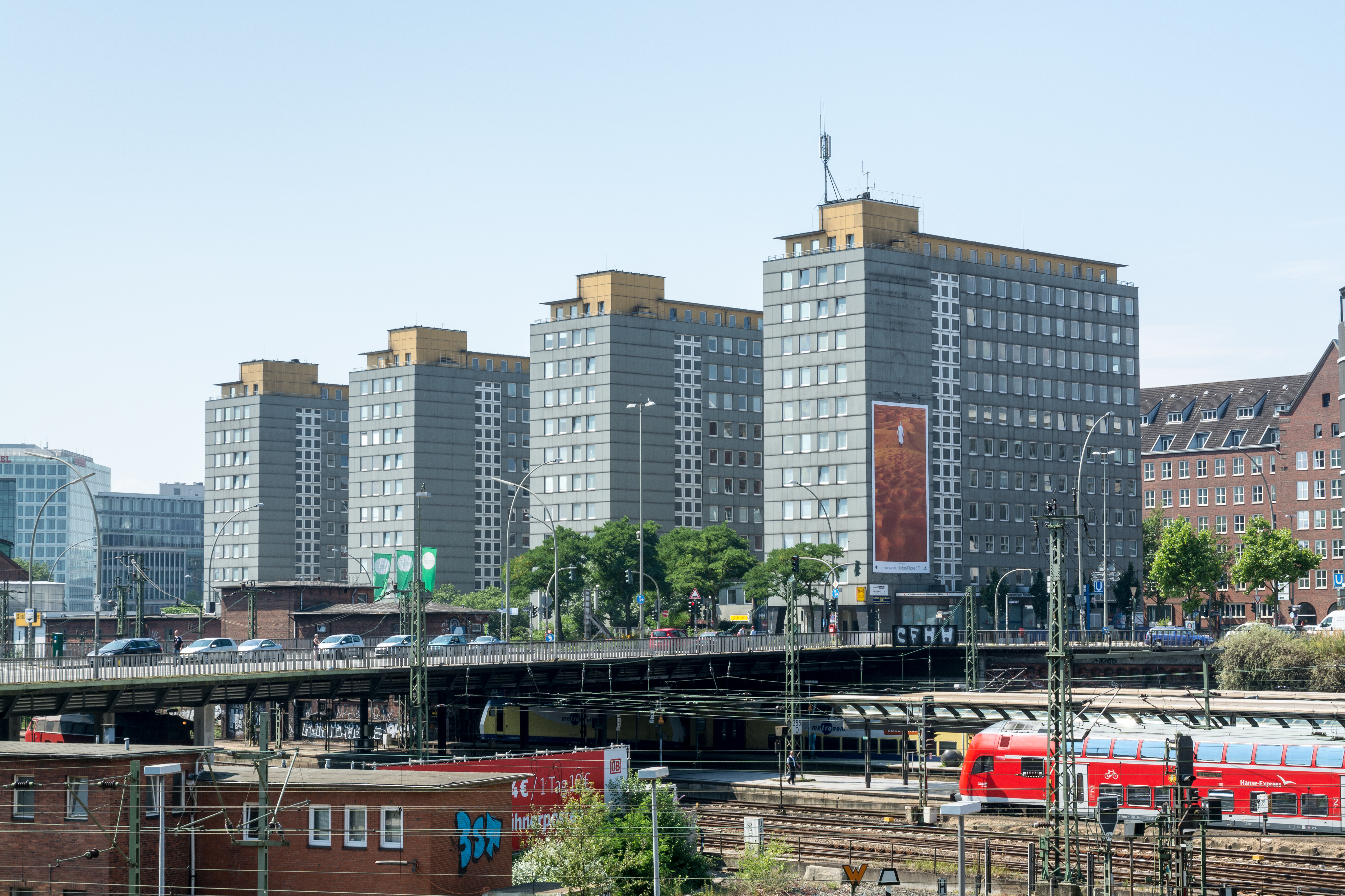 City-Hof in Hamburg-Altstadt, Fassaden Richtung Klosterwall. This is a photograph of an architectural monument.